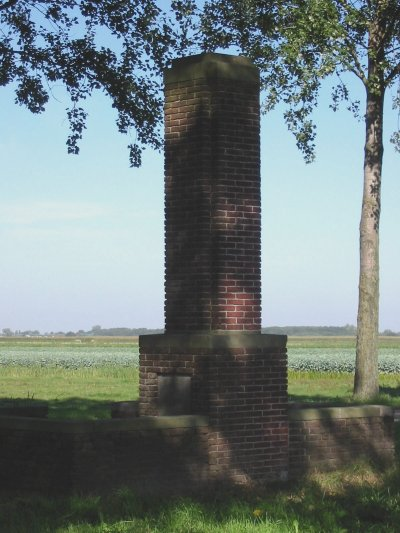 Monument Jacobswoude verdwenen dorp, september 2003, foto gemaakt en ter beschikking gesteld voor vrij gebruik door Gebruiker:Ellywa.